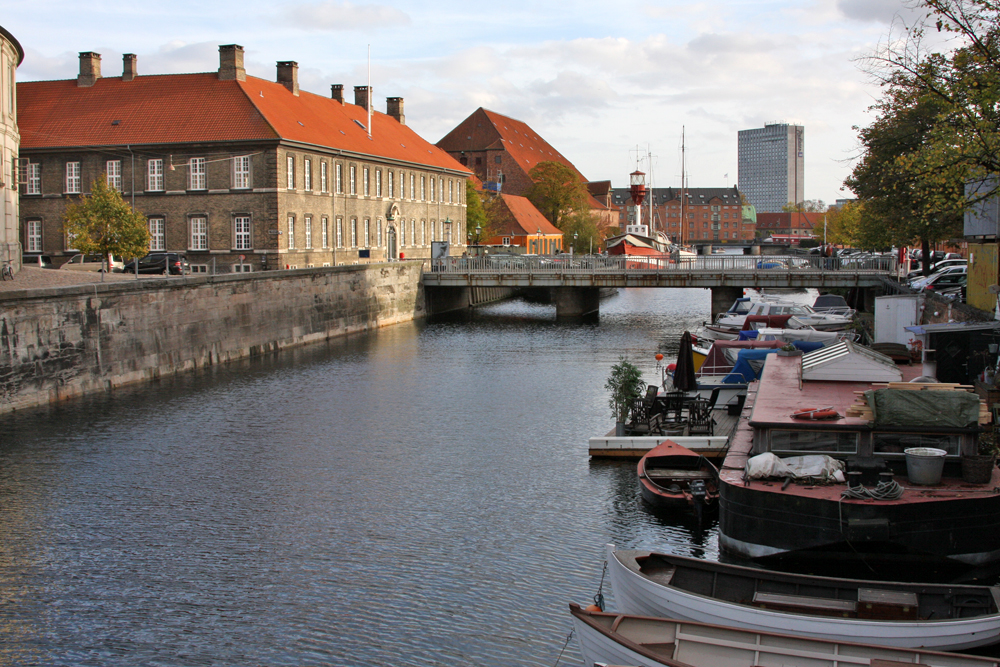 Staldmestergården at Frederiksholms Kanal with Prinsens Bro